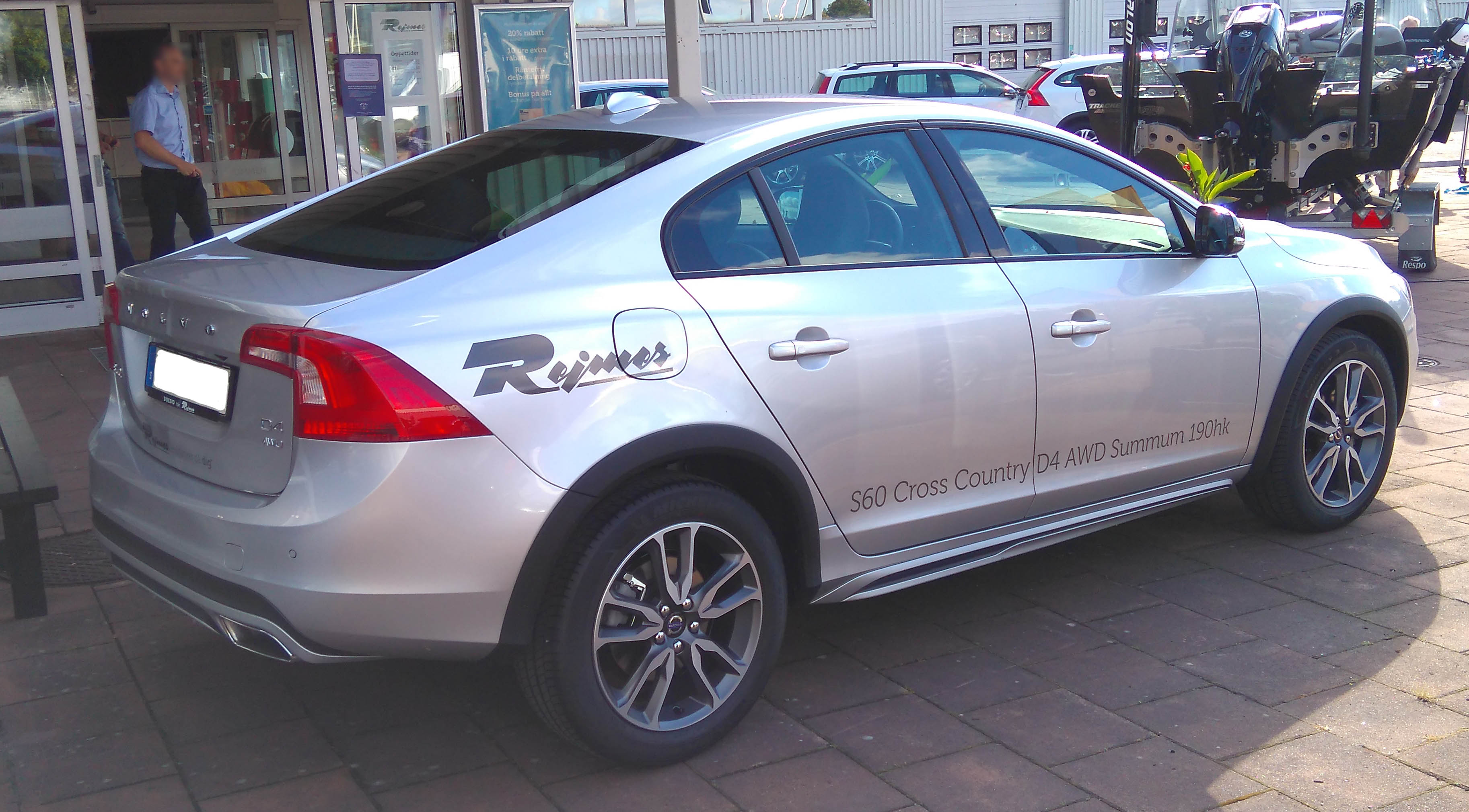 2016 Volvo S60 Cross Country